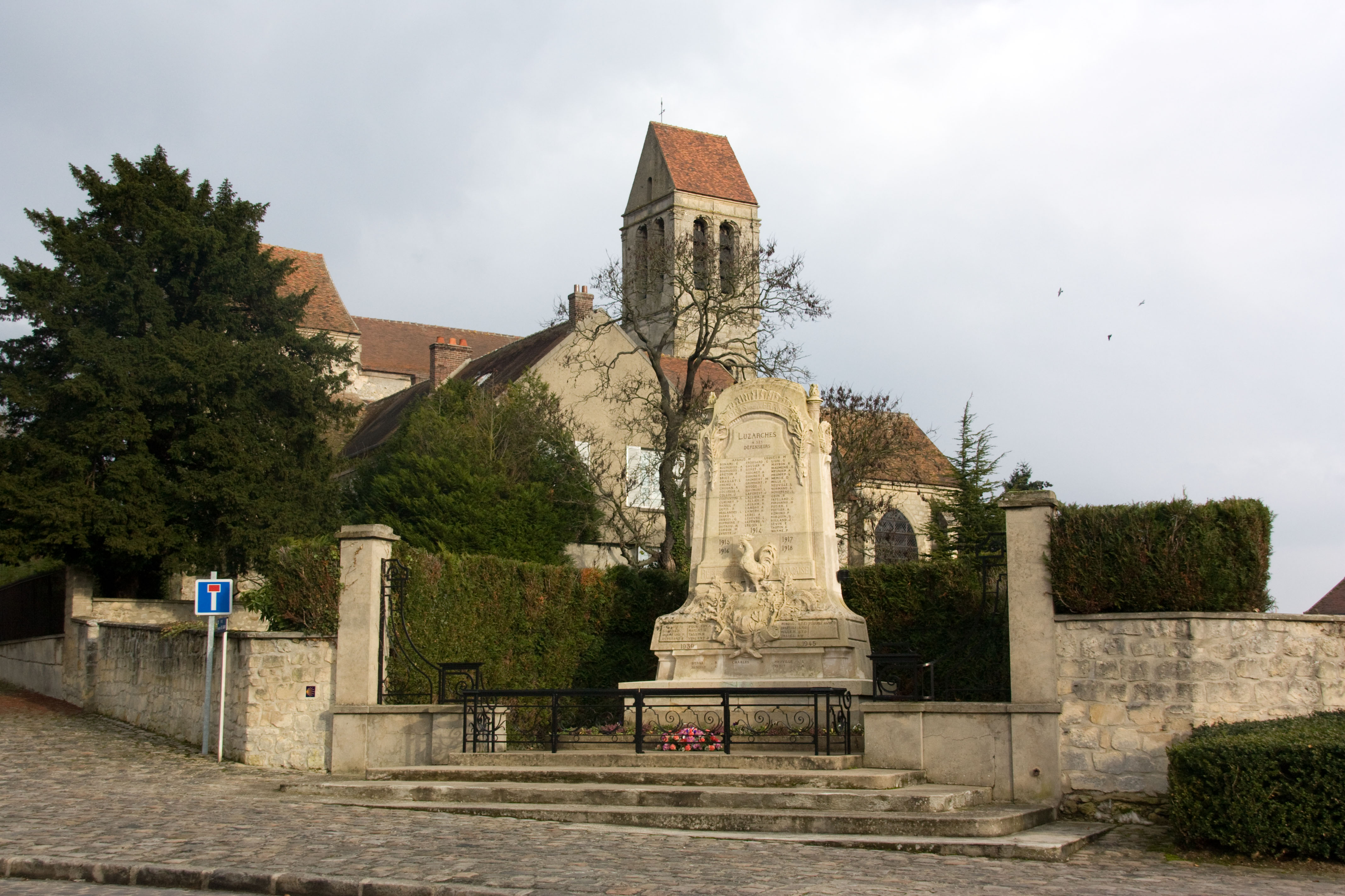 Monument aux morts de Luzarches, Luzarches, Val-d'Oise, France